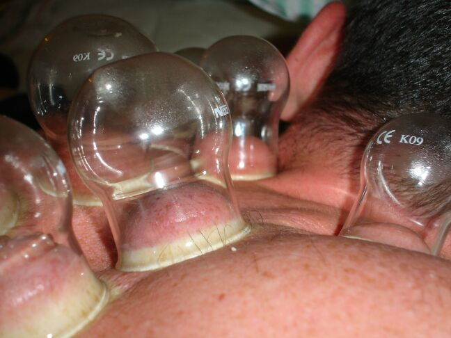 Schroepfen